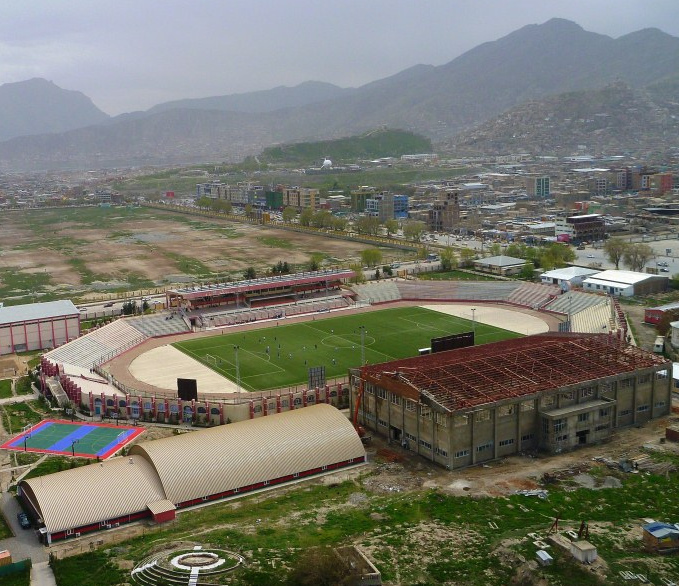 Ghazi Stadium